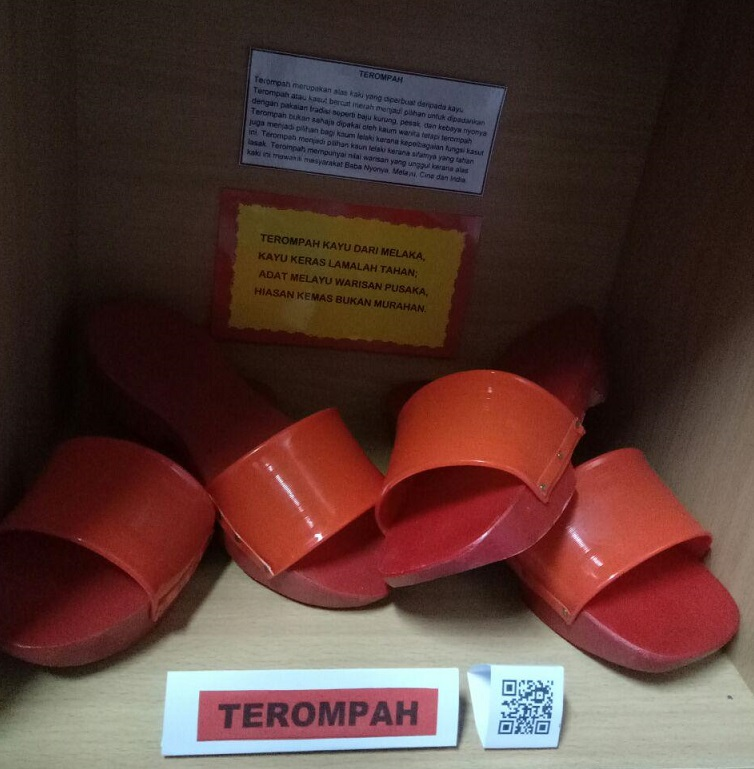 Terompah